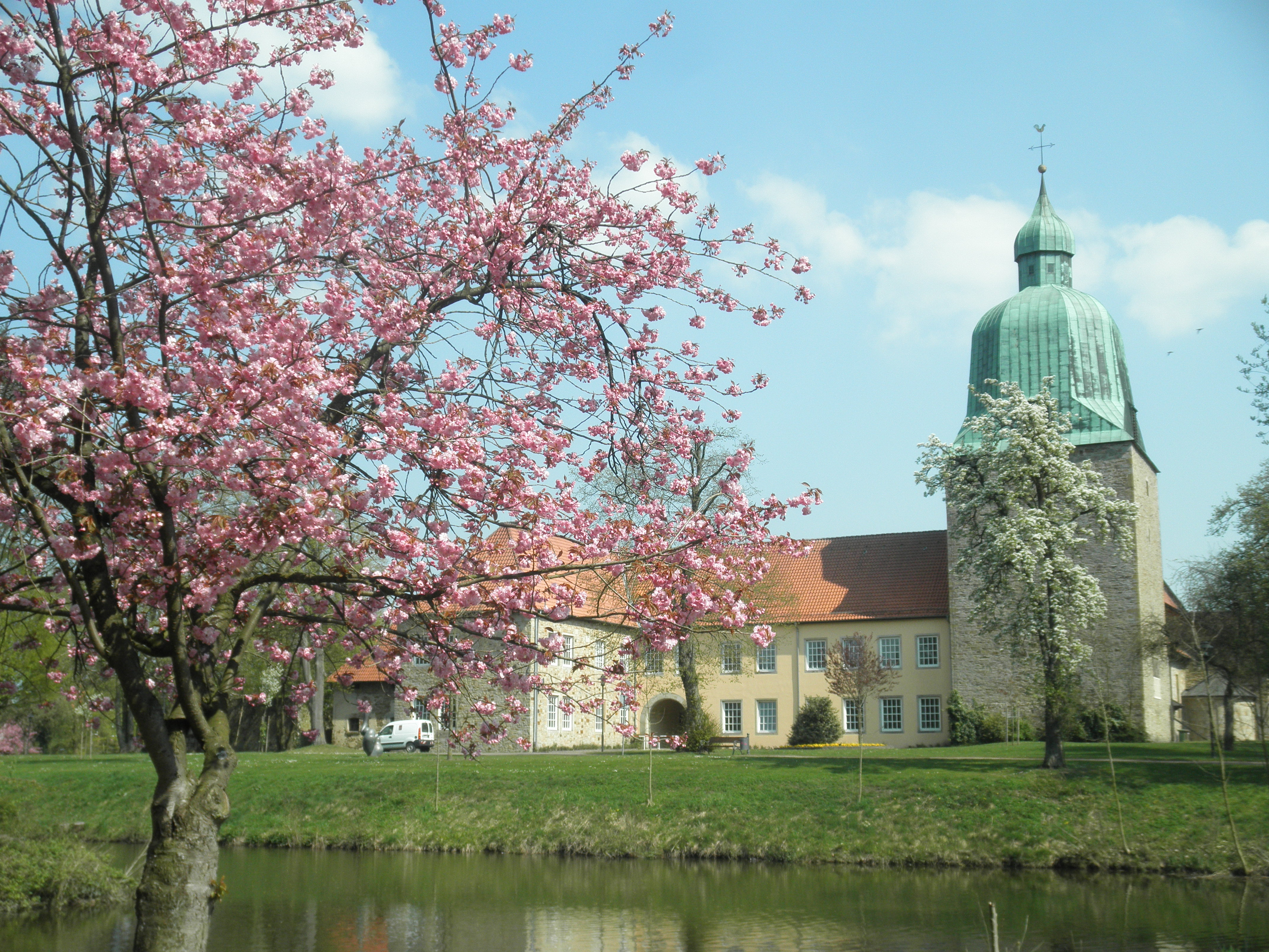 Kastelo Fürstenau